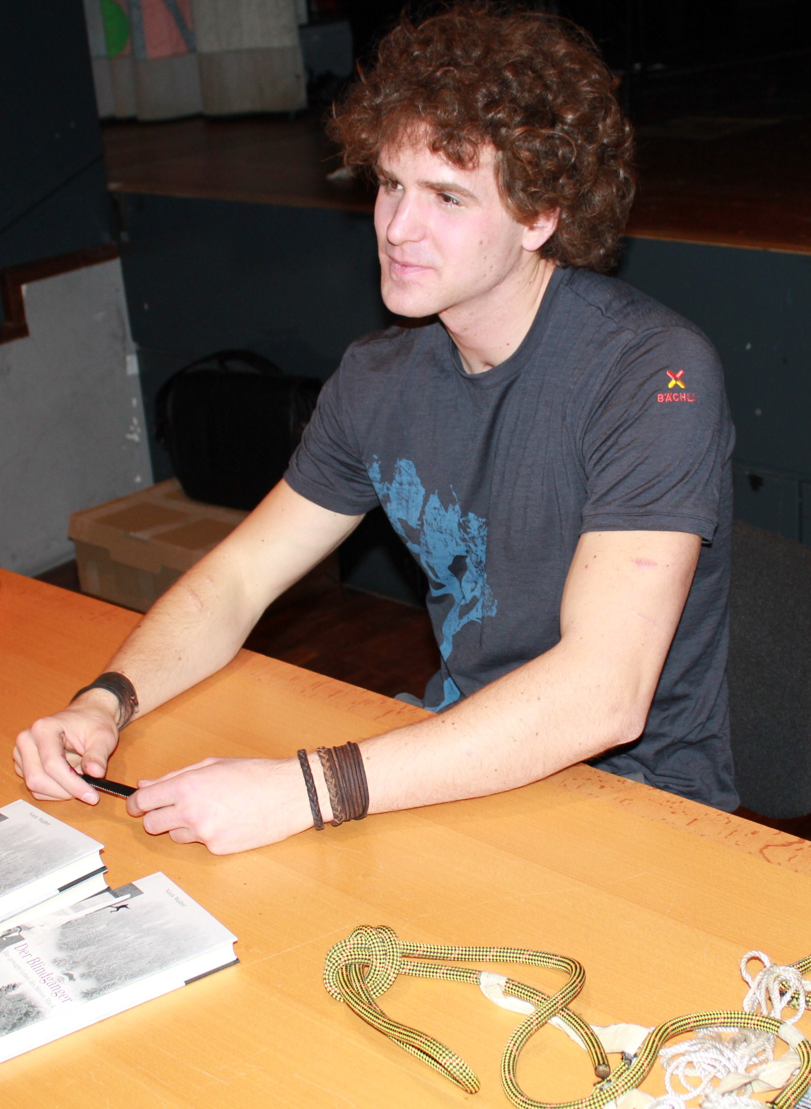 Der erblindete Sportkletterer Steven Mack bei einer Buchpräsentation.